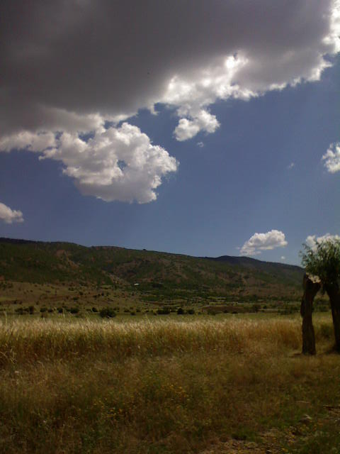 pincirik